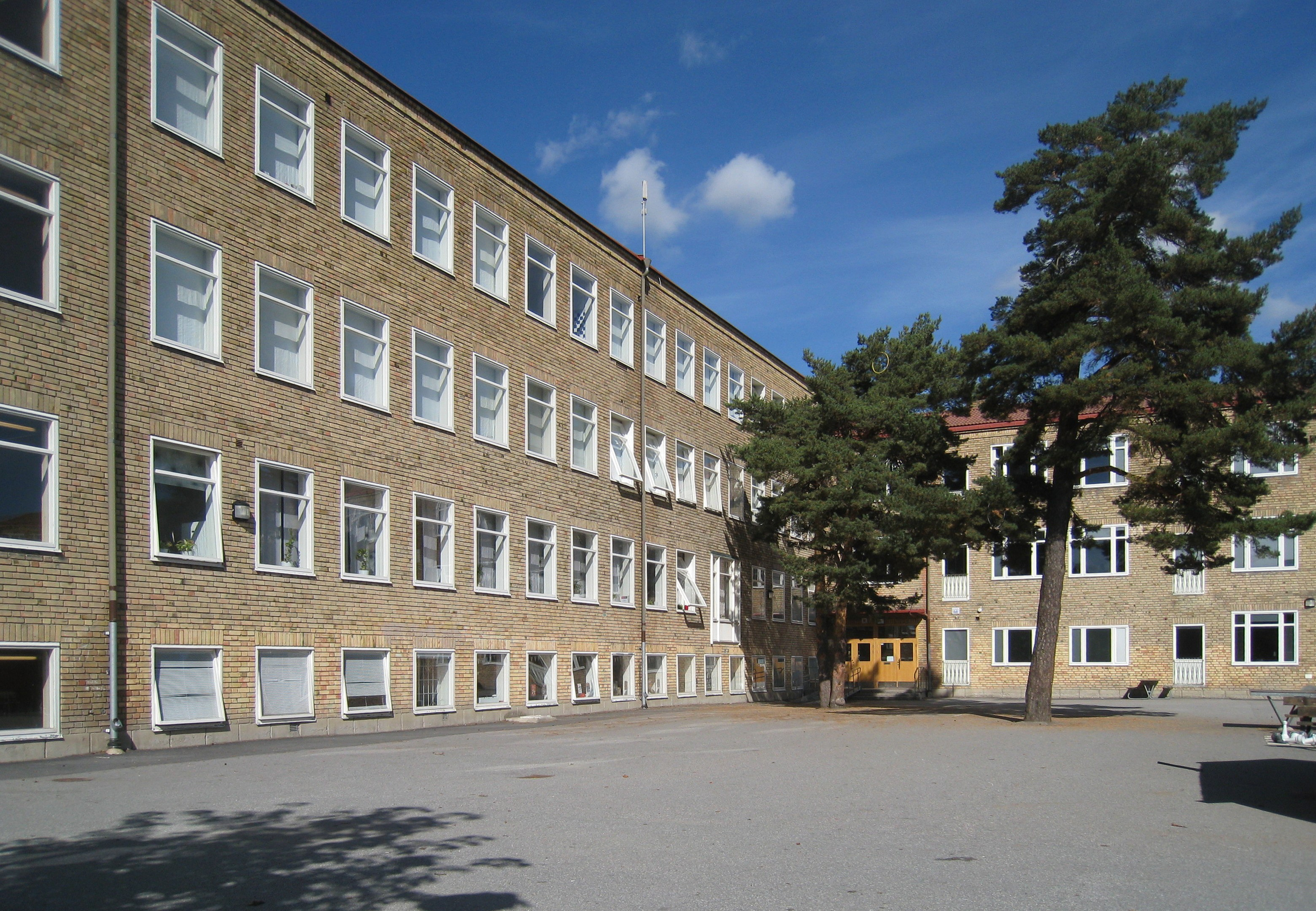 Abrahamsbergsskolan på Gustav III:s väg 2-4 i hörnet av Ritarvägen 9-11, Abrahamsberg, Bromma, i västra Stockholm. Skolan byggdes i gult tegel 1946, arkitekt var Paul Hedqvist.